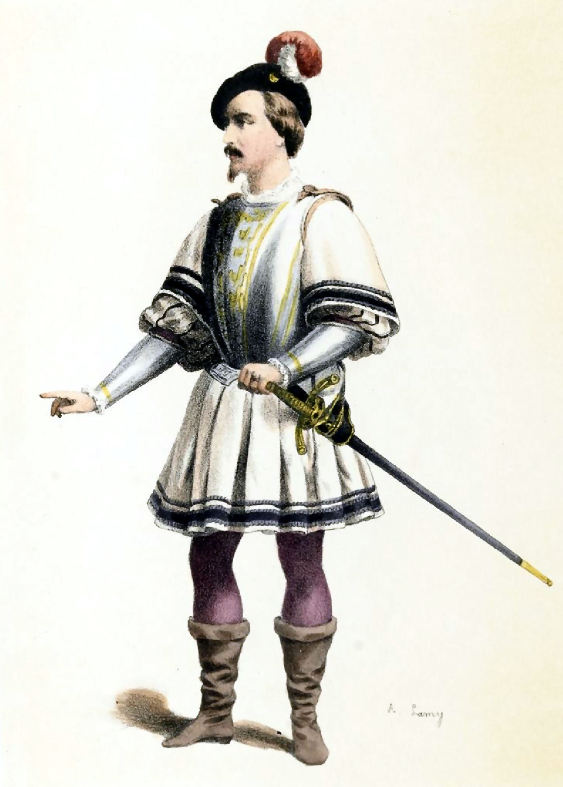 Costume de Victor Warot dans le rôle de Don Alvar dans L'Africaine de Meyerbeer